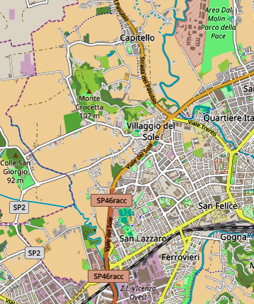 mappa Circoscrizione 6